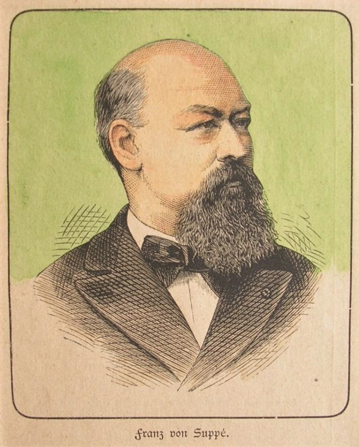 Franz von Suppé, kolorierter Holzstich, ca. 10 x 8,5 cm